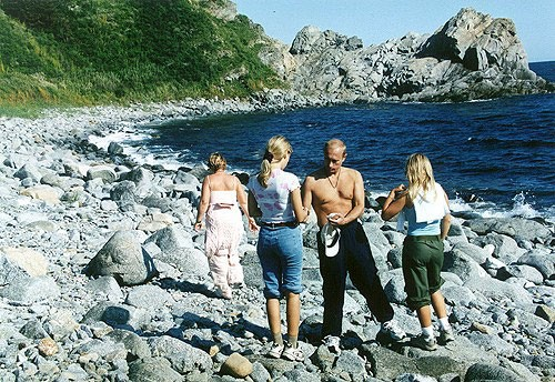 Приморский край. Морская прогулка.